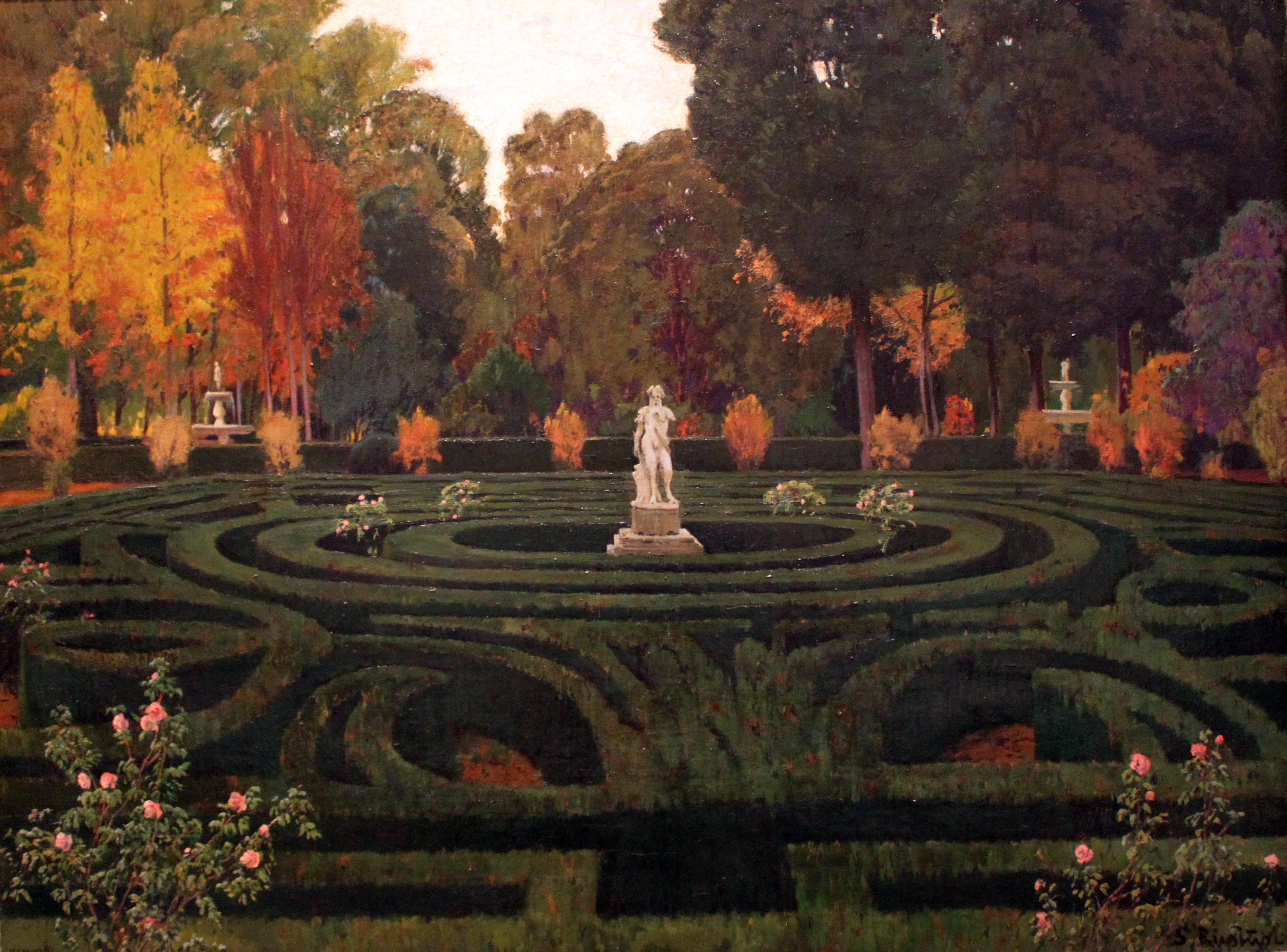 Serie Parterres d'Aranjuez (Parterres de Aranjuez)